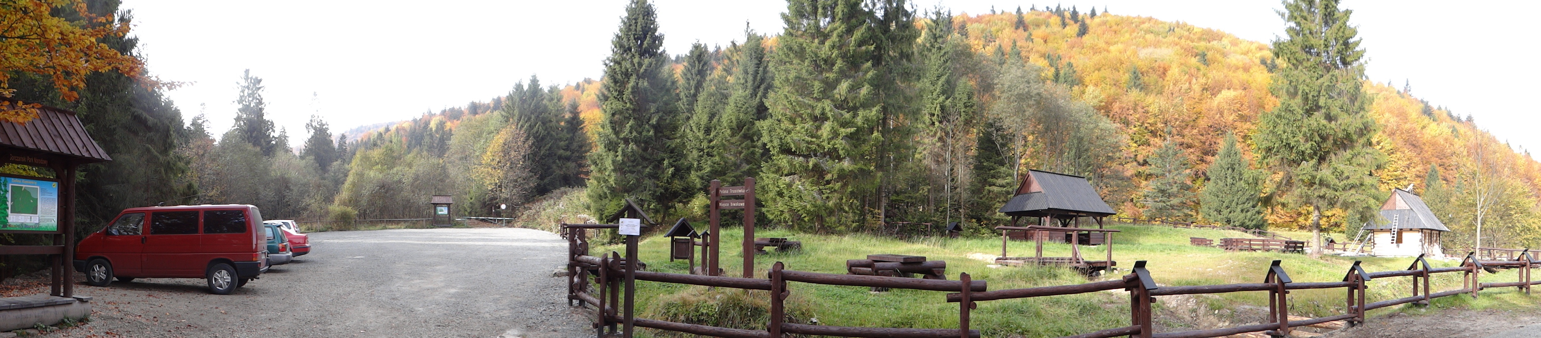 Trusiówka